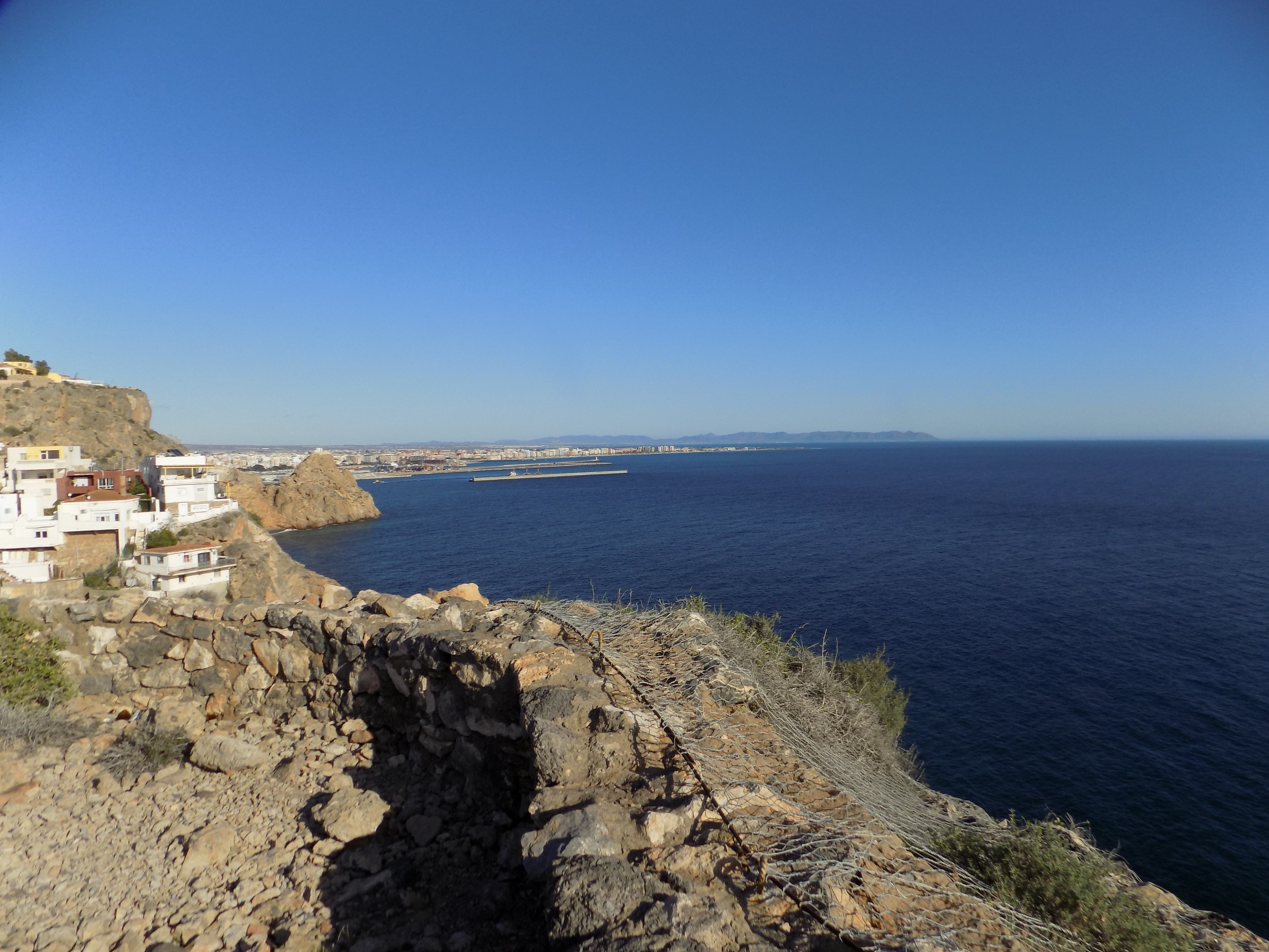 Castell del Rey